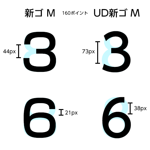 比較として「8」の数字（水色の文字）と「3」「6」を重ねています。